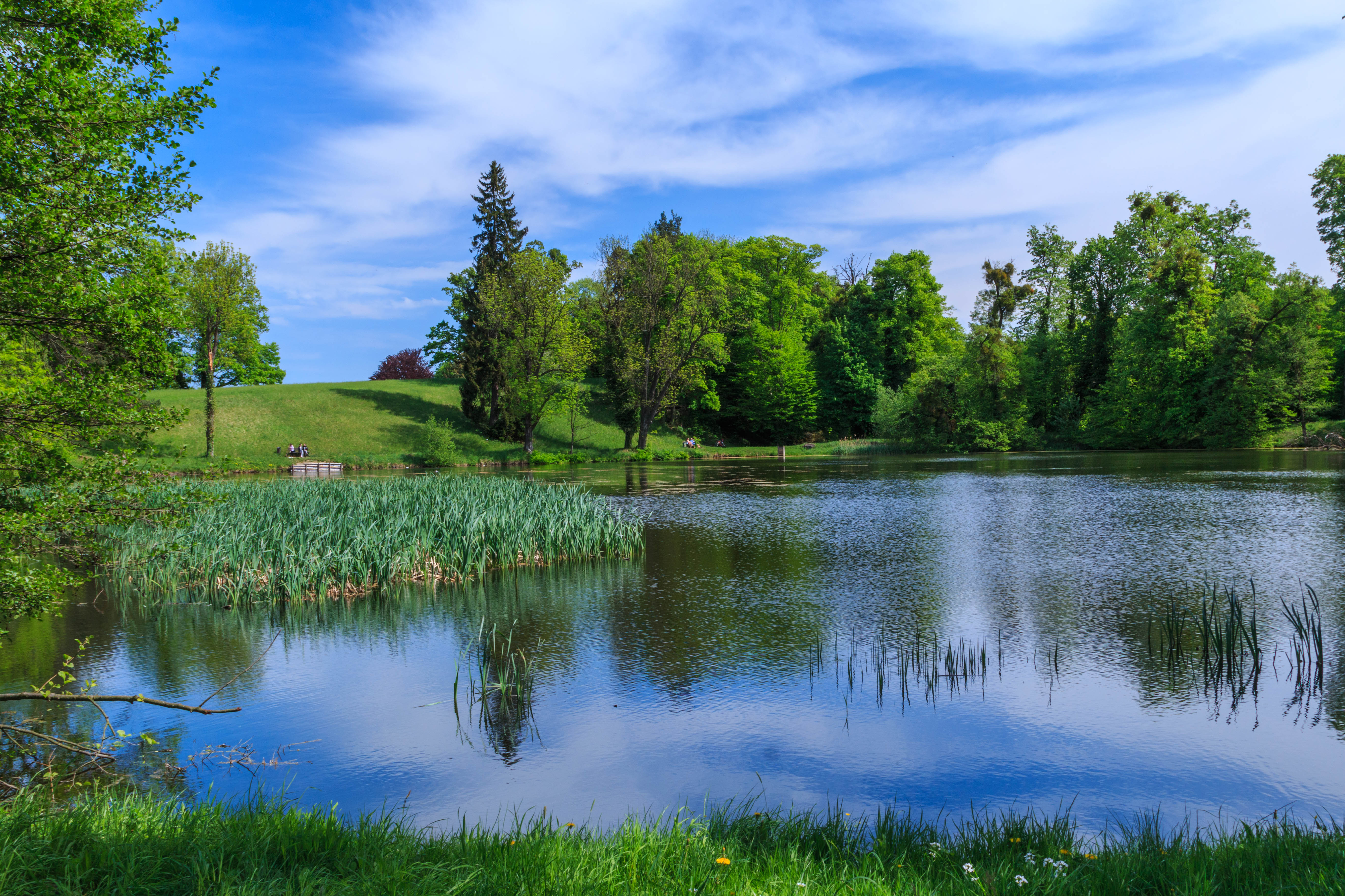 Zámecký rybník v Heřmanově Městci Project: Vodstvo.